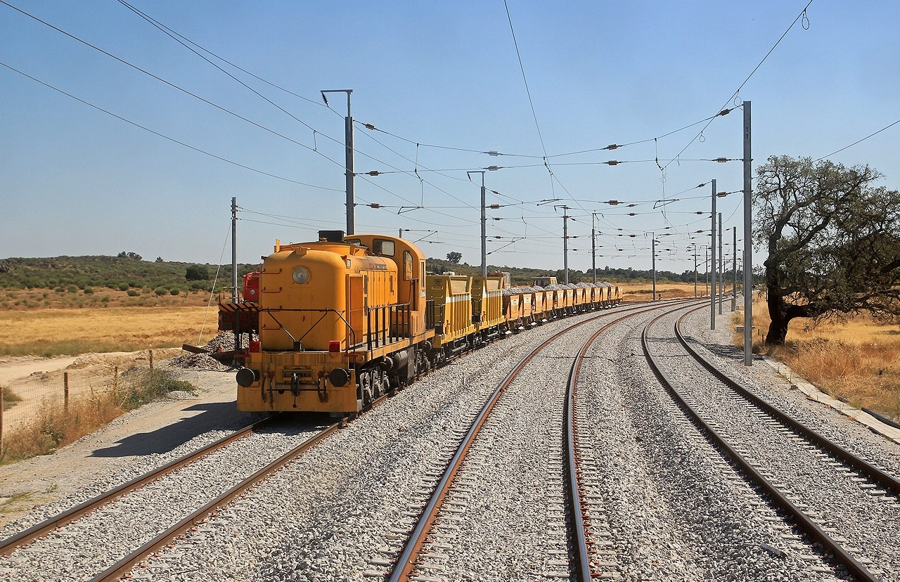 "Estacionada" em Alcains, encontrava-se no momento em funções nas obras de modernização da Linha da Beira Baixa 23 Julho de 2010 Alcains, Linha da Beira Baixa